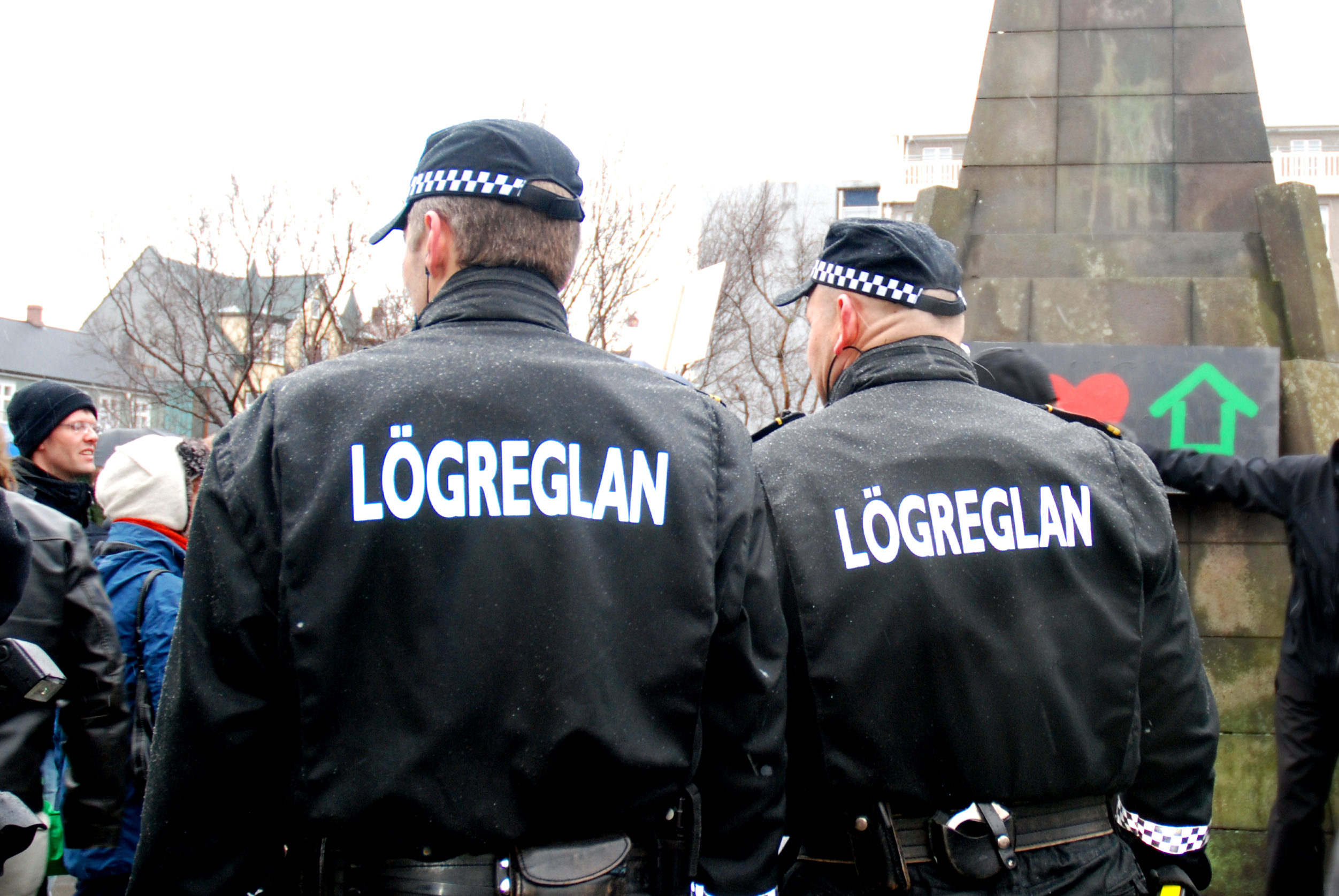 Politi i Reykjavik